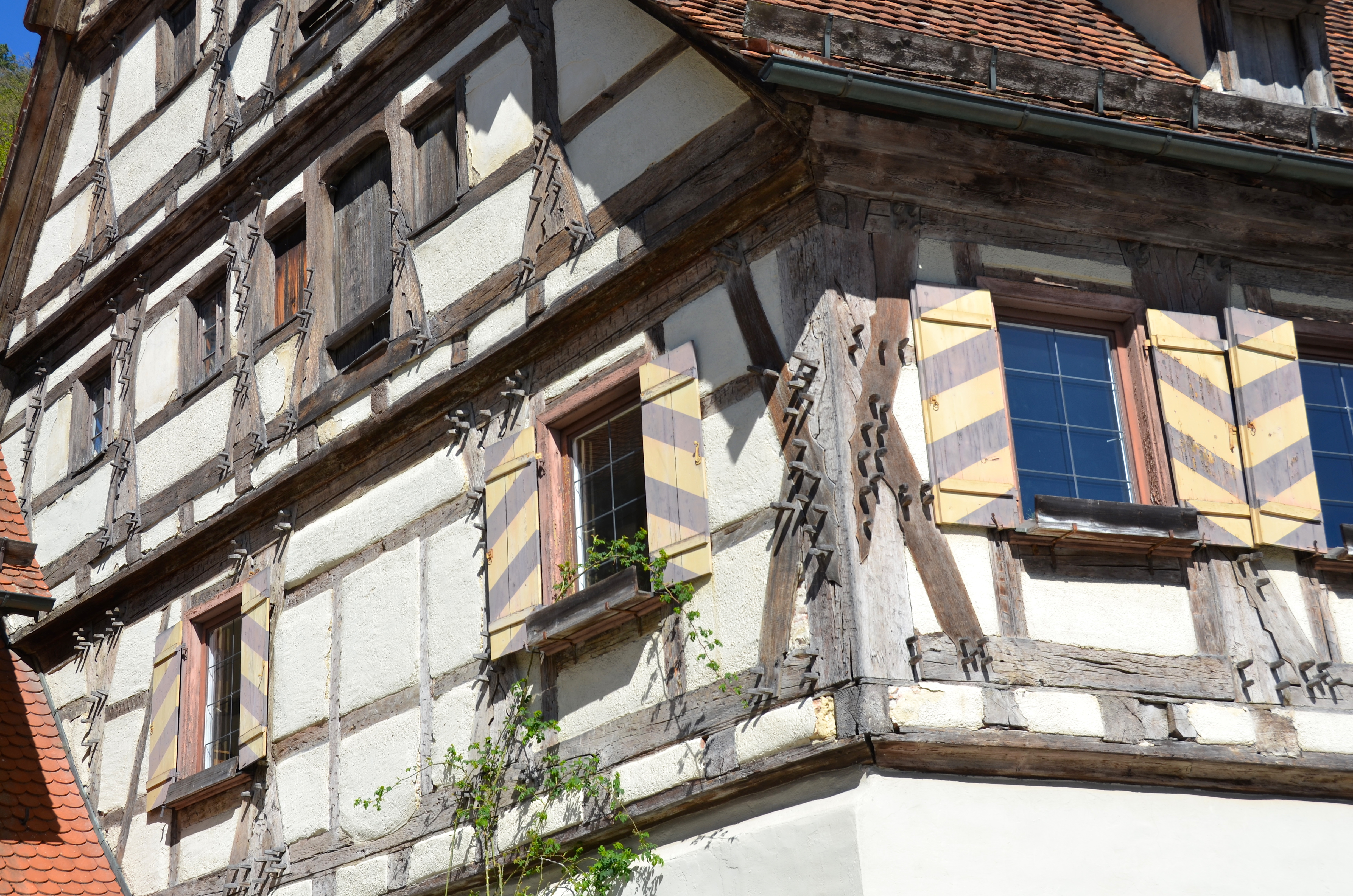 Holznägel, Fachwerk, Bandhaus, ehemalige Küferei und Klosterkeller von 1478, Kloster Blaubeuren